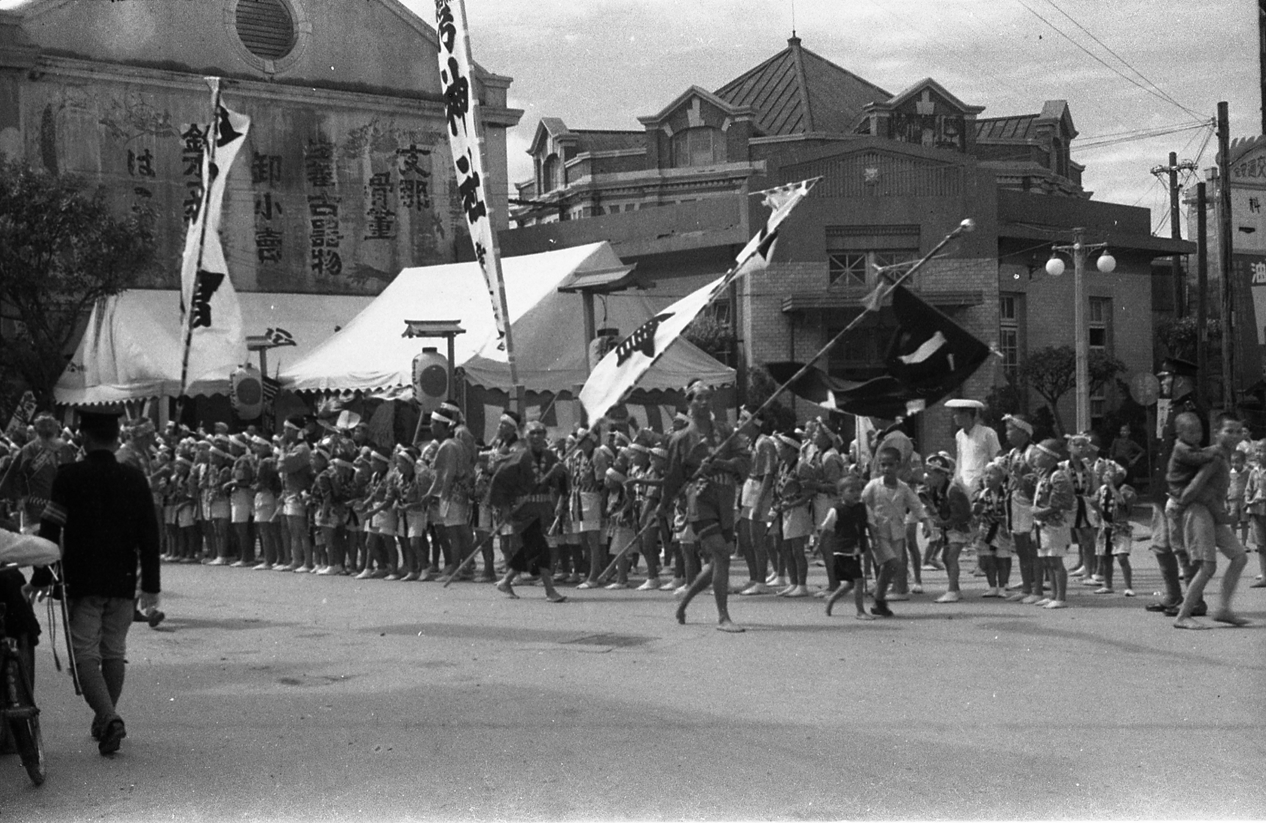 臺灣神社祭典遊行活動。